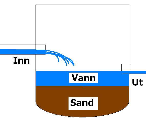 Sandfang